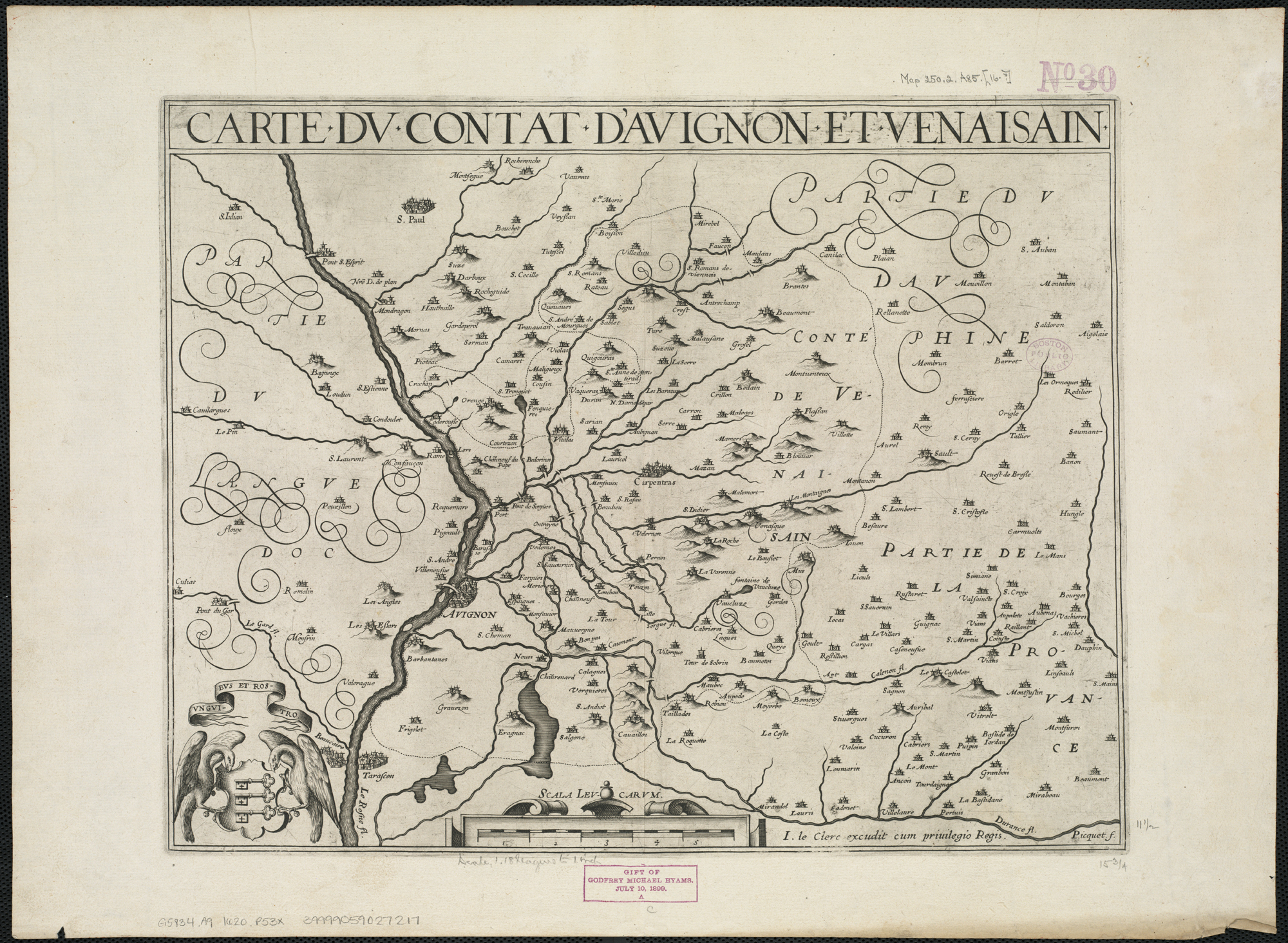 Carte d'Avignon et du Comtat Venaissin 1620 Dessinateur : Jean Picquet, éditeur : Jean Leclerc